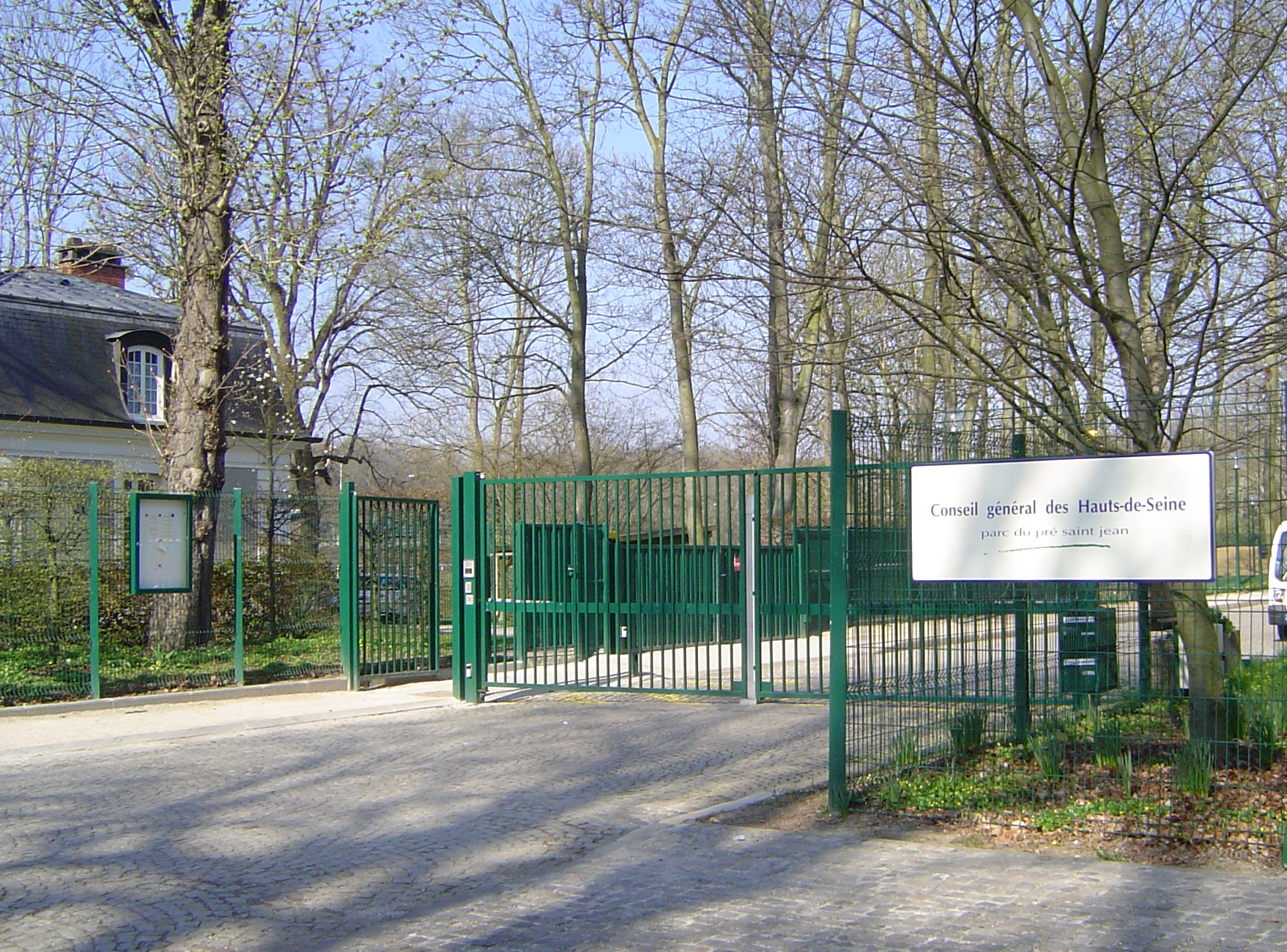 Le Pré St jean